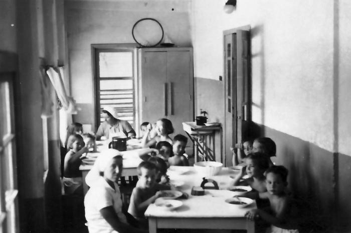 הגננת פנינה ברונשטיין והמטפלת שרה שפירא בעת ארוחה עם הילדים בבית הקומותים הראשון 1935-40